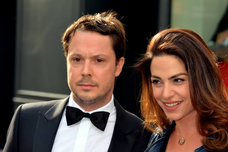 Davy Sardou et Noémie Elbaz à la cérémonie des Molières